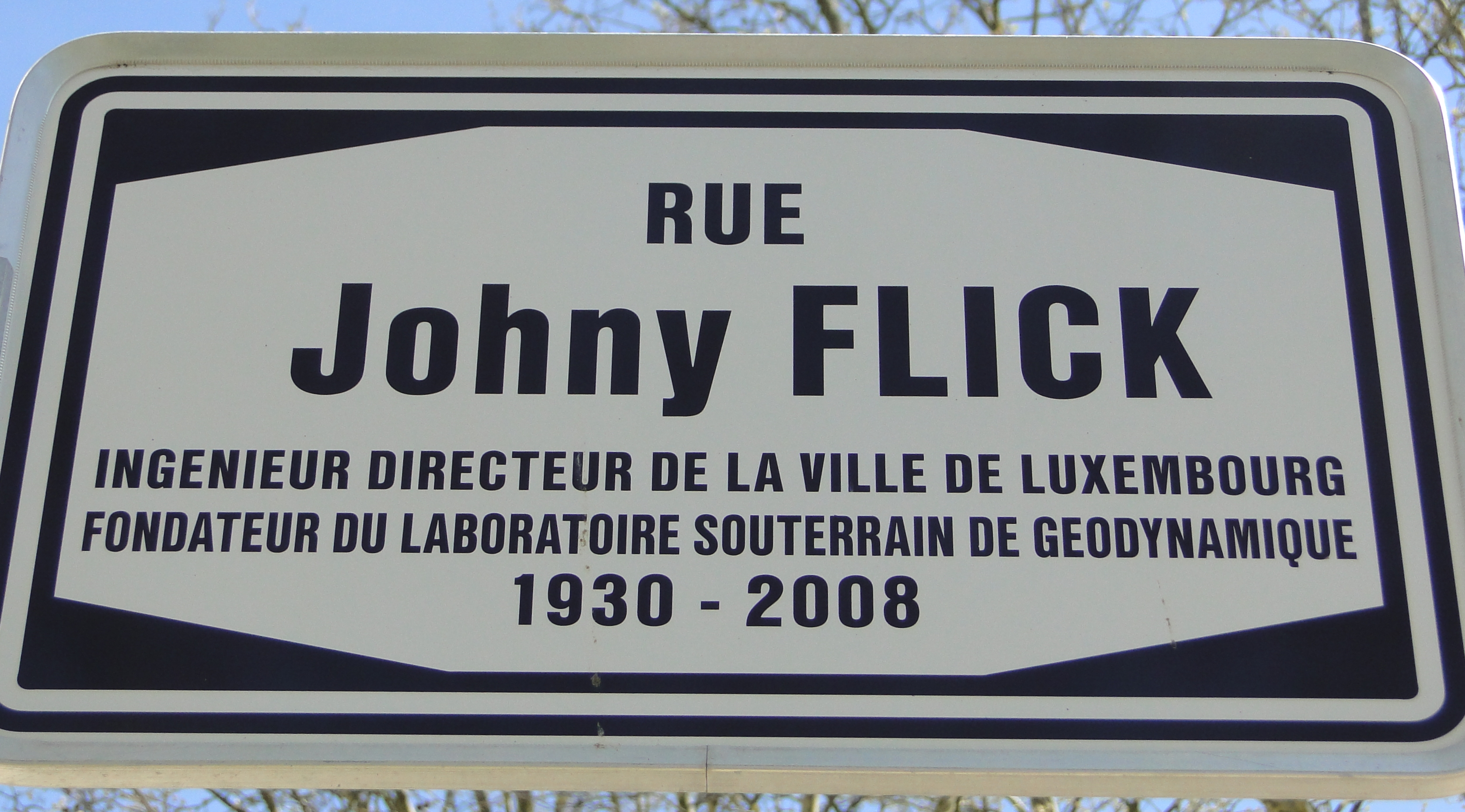 Plaque de nom de rue à Luxembourg